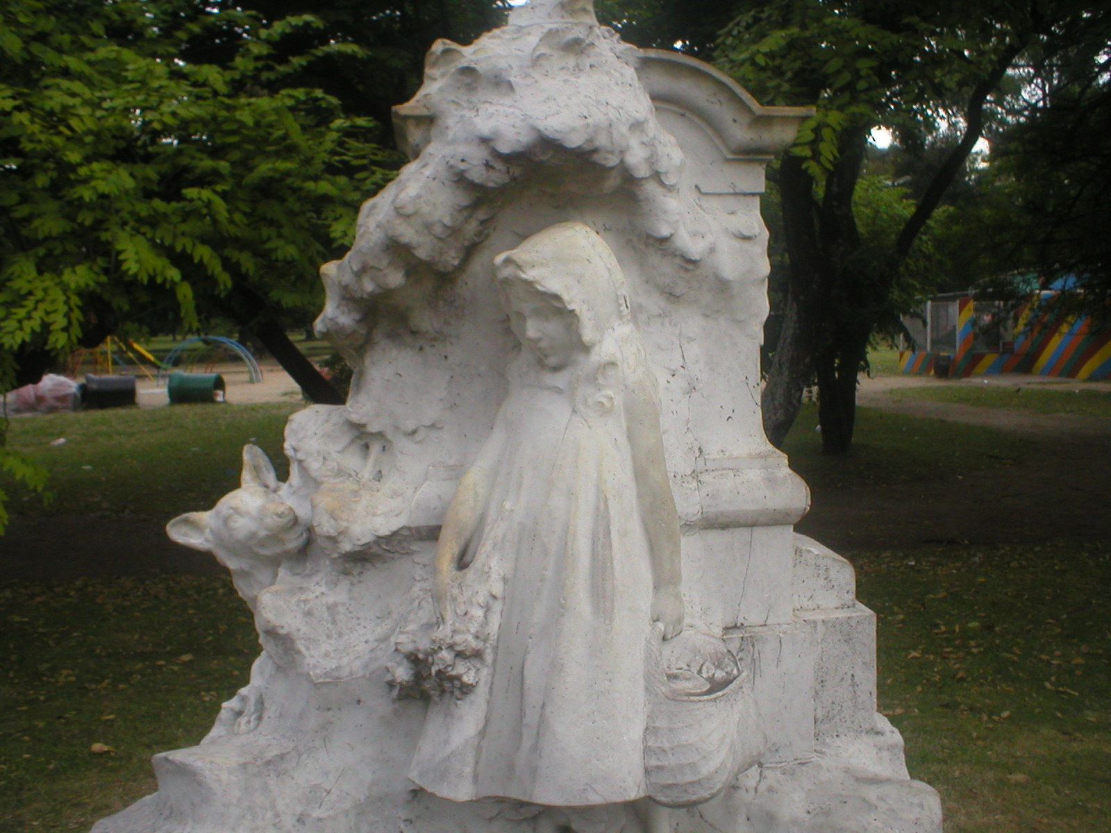 Estatua de Caperucita roja (1937) en Plaza Sicilia, barrio de Palermo, Buenos Aires. Obra del francés Jean Carlus.